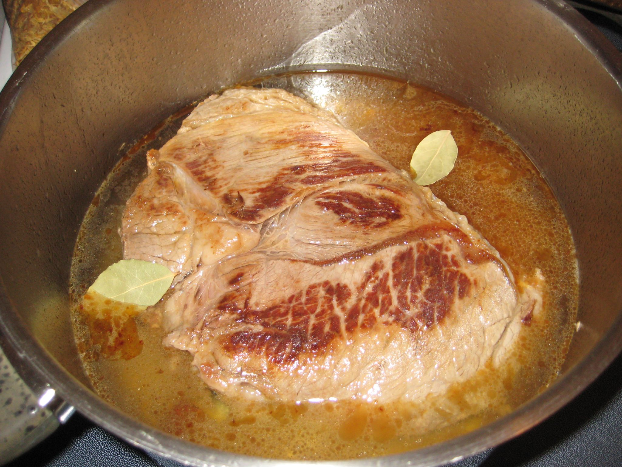 Pot roast